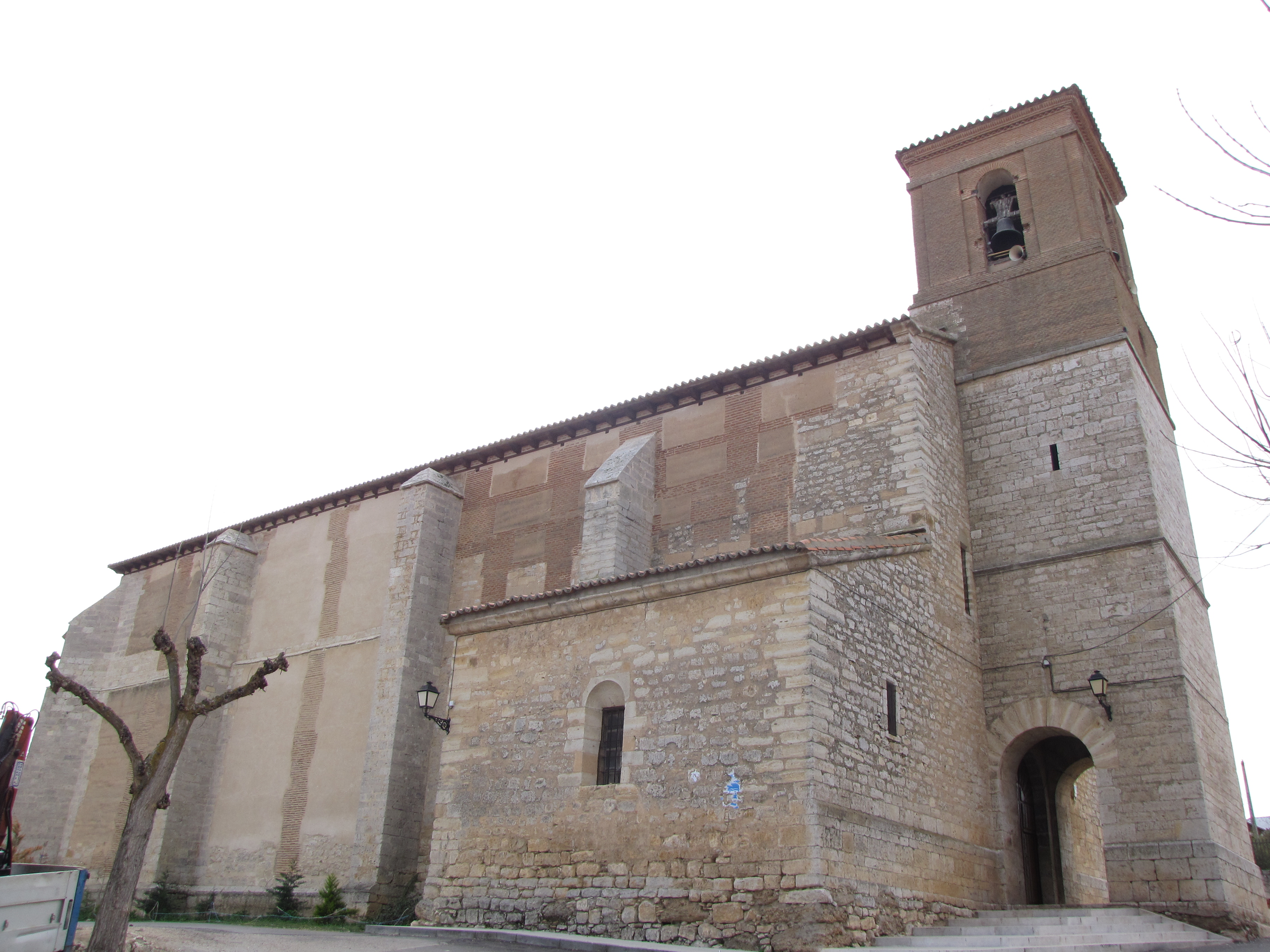 Iglesia parroquial - Vista general